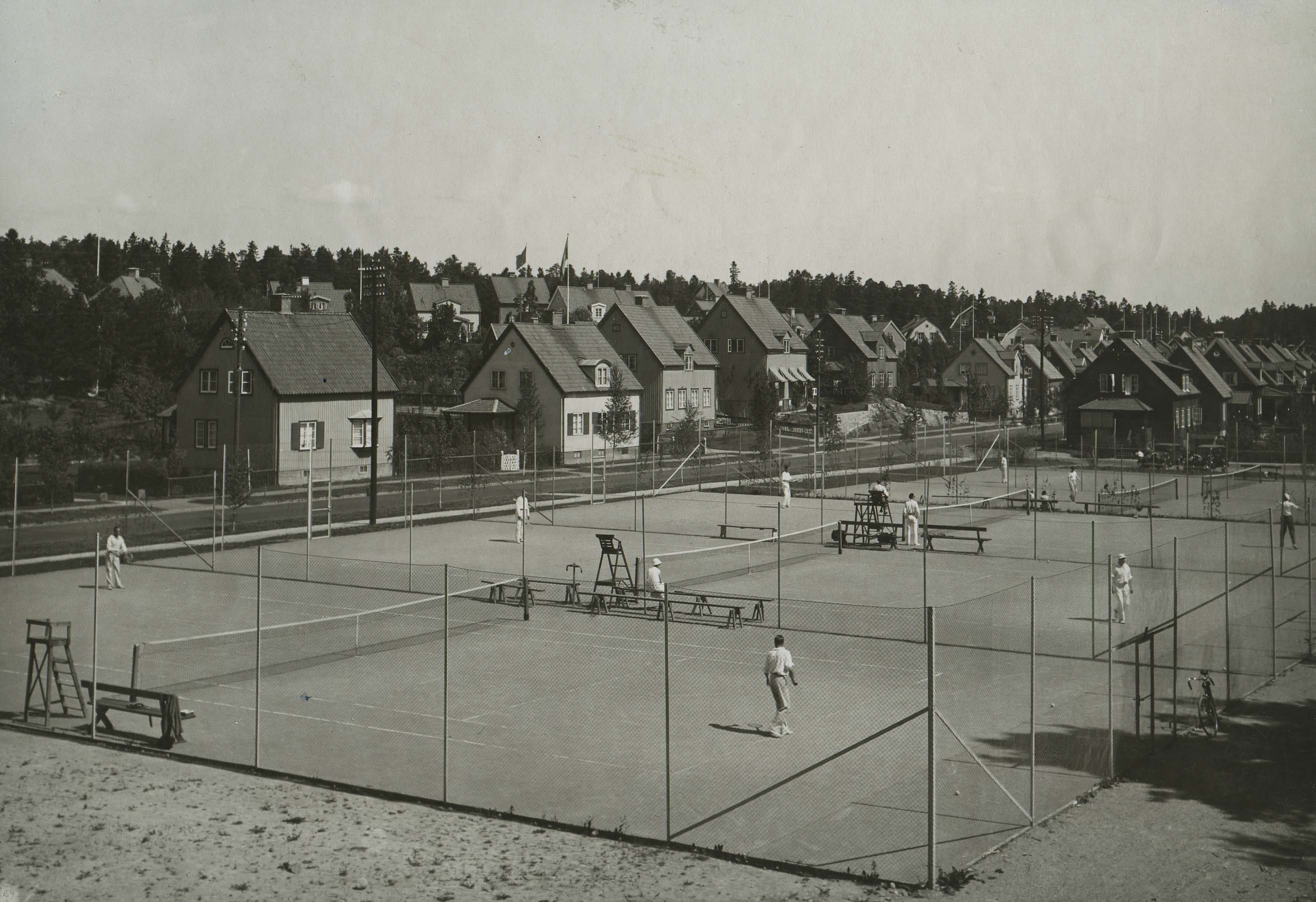 Smedslättens tennisbanor 1933, på Alviksvägen 161 i Smedslätten, Bromma, väster om Stockholm. Smedslättens Lawn Tennisklubb , SMLT, höll till på banorna.